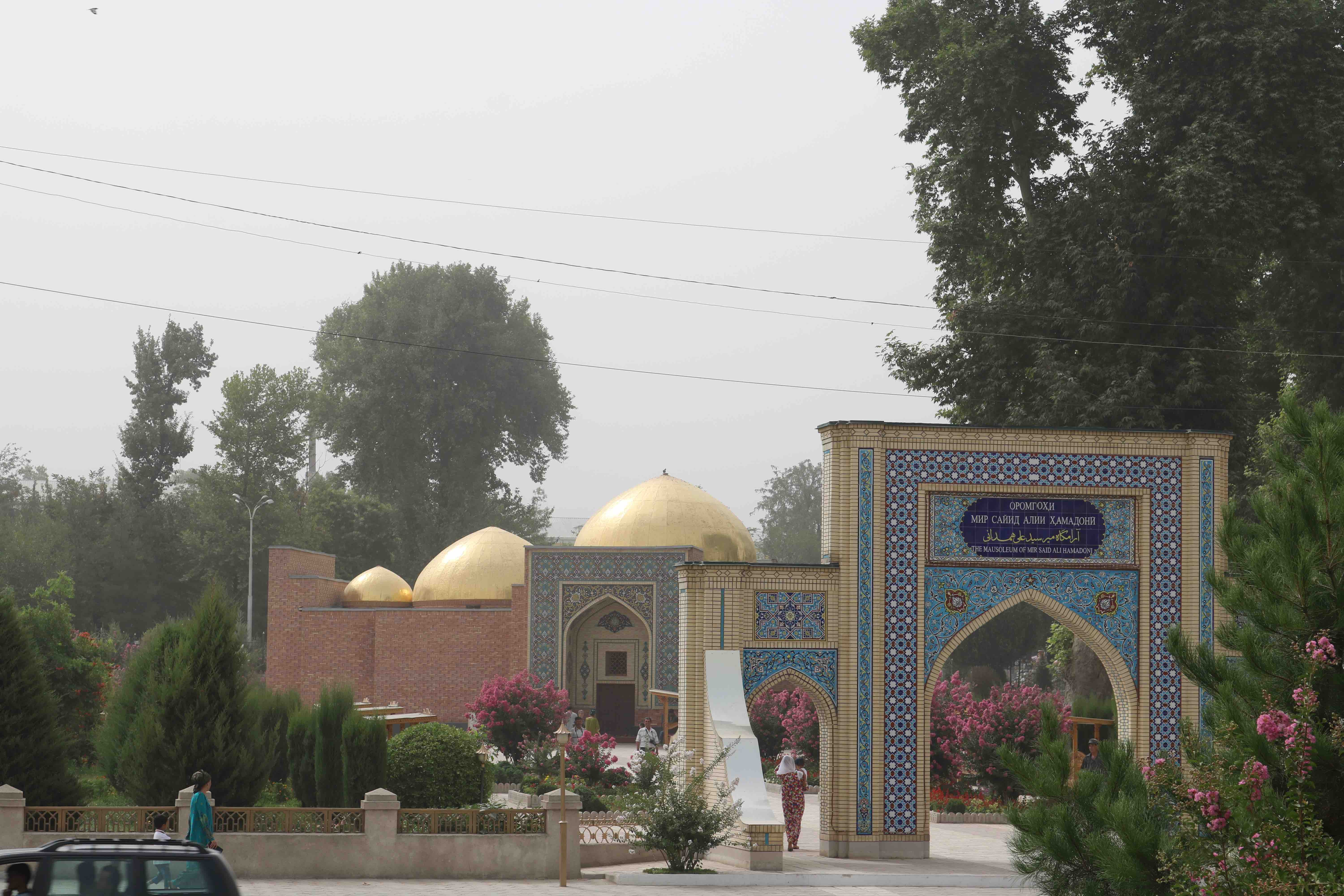 Mausoleum of Mir Sayyid Ali Hamadani in Kulob, Tajikistan